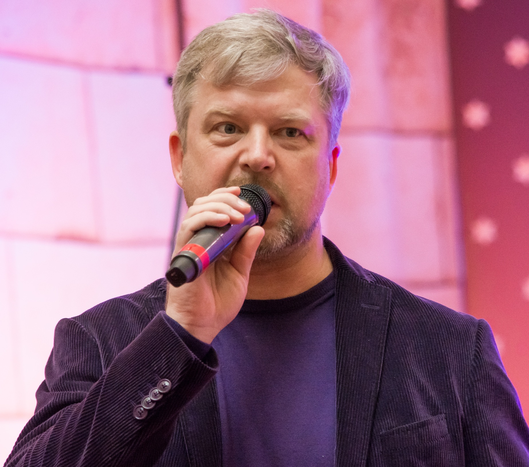 Валдис Пельш в ЦДМ на Лубянке во время награждения победителей XVI всероссийской ежегодной выставки-конкурса стендового моделизма.